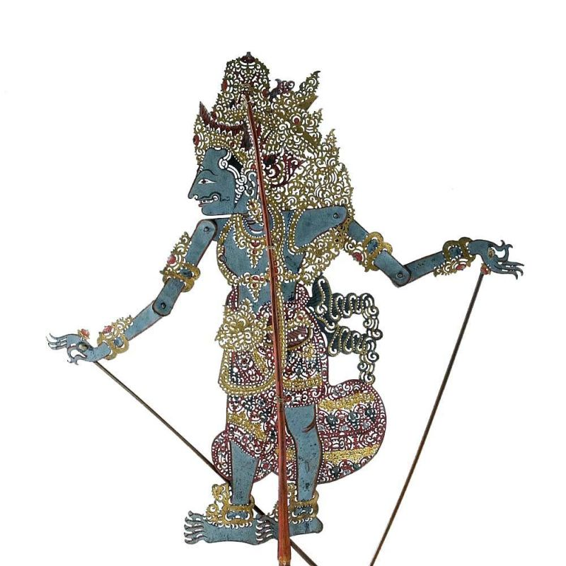 Schaduwfiguur. Wajangpop van karbouwenhuid, voorstellende Prabu Kresna Unknown language: Wayang kulit purwa